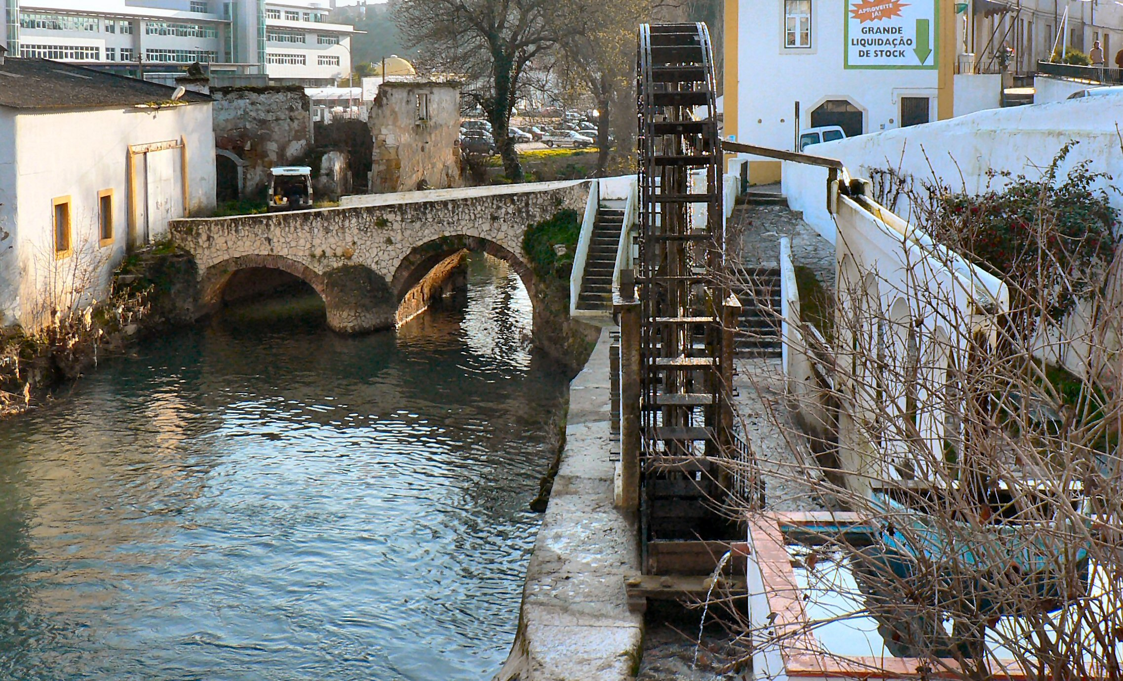 Ponte romana e nora em Torres Novas sobre o Rio Almonda.